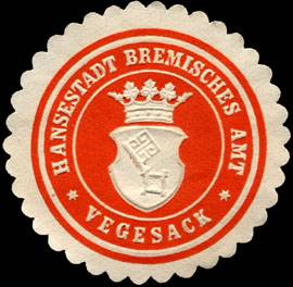 Sealing stamp Title: Hansestadt Bremisches Amt - Vegesack Description: rot, weiß, geprägt Place: Bremen size: 4 cm